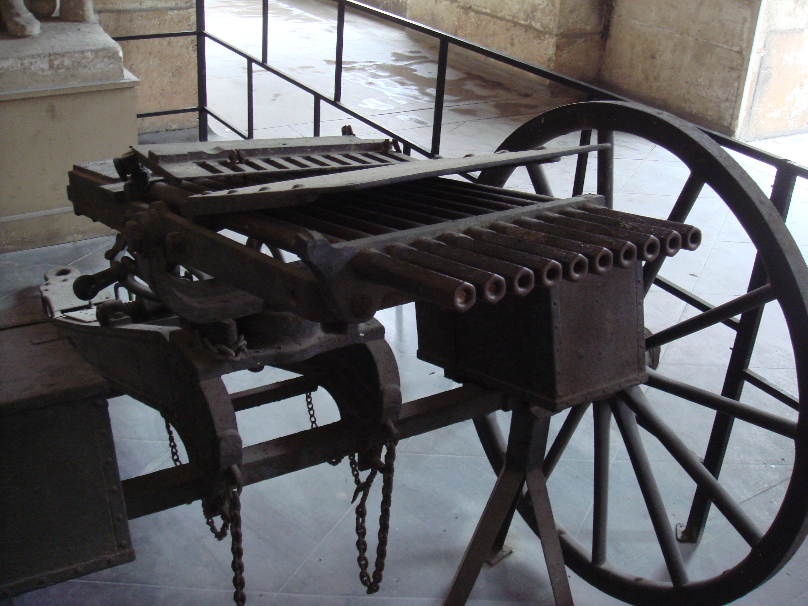 Nordenfelt_machine_gun_10_barrels